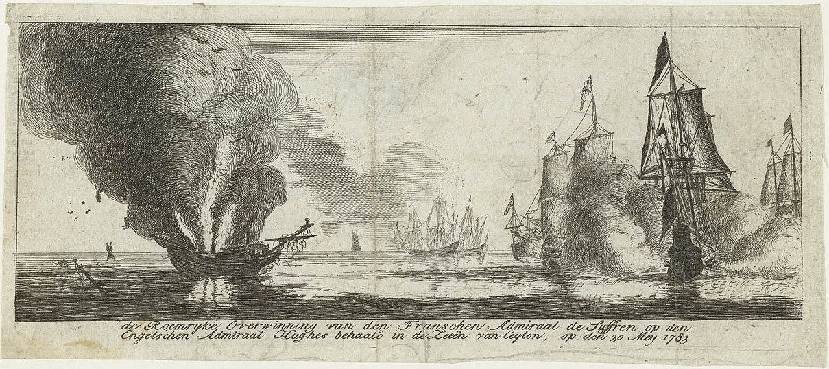 Naval battle.